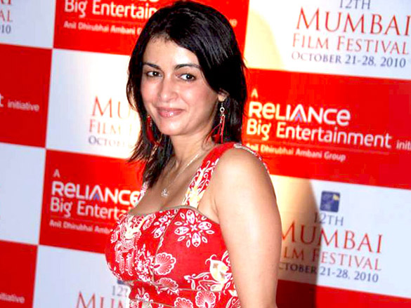 Anaida at 12th Mumbai Film Festival .